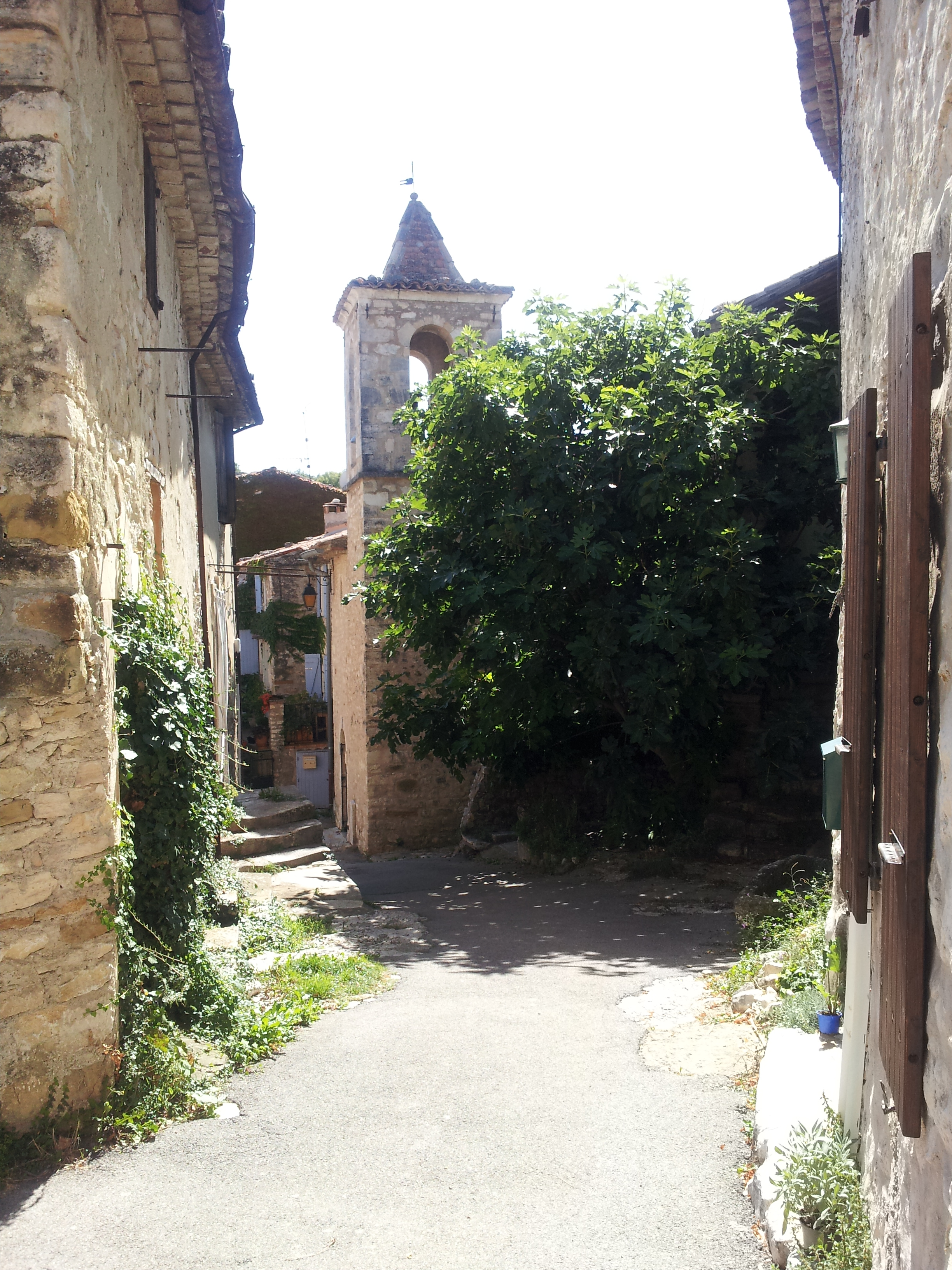 ruelle du village